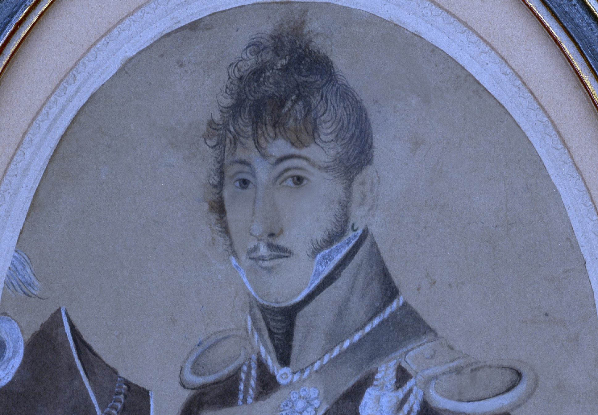 Darstellung als Subalternoffizier, Medaillon in Gouache-Technik